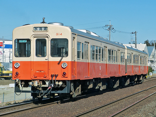 関東鉄道キハ310形気動車。新守谷〜小絹間にて撮影。